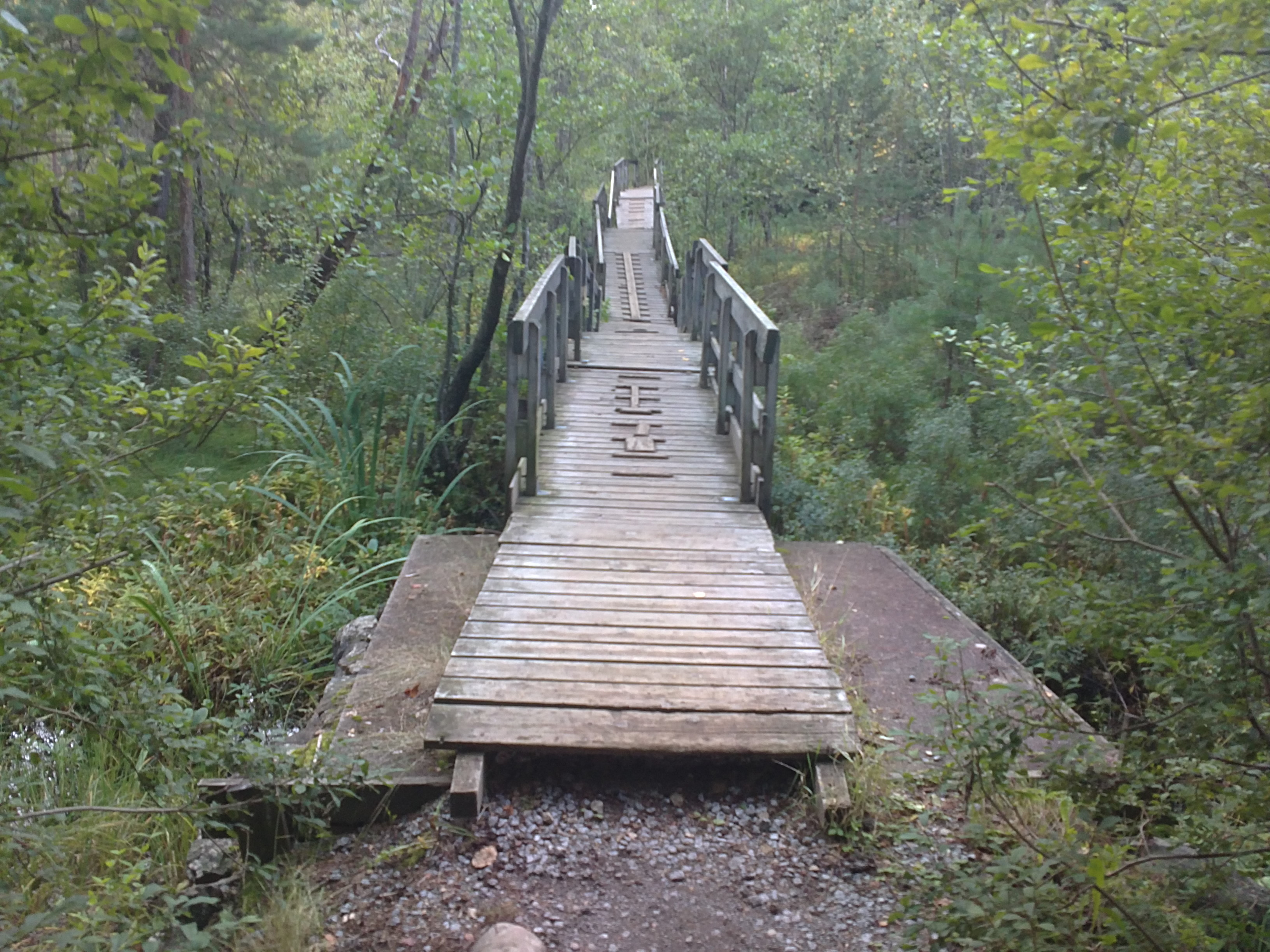 Bilde av bru ved Farris Naturskole